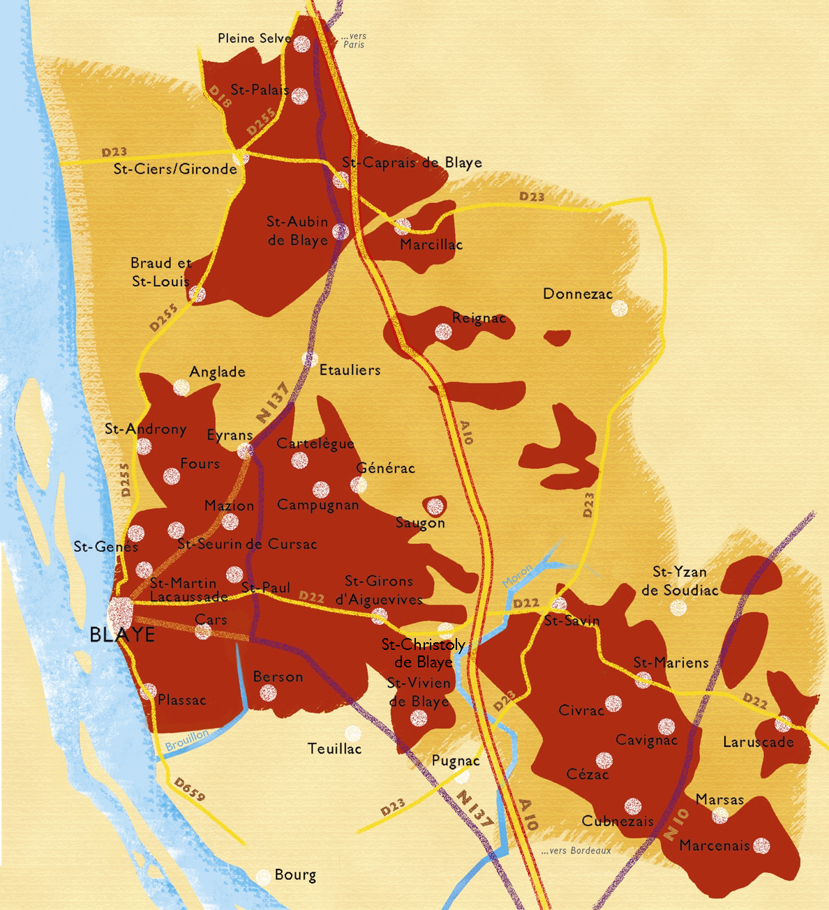 Vignoble de Blaye Côtes-de-Bordeaux